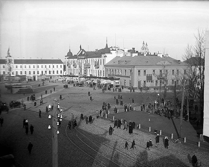 Беларуская (тарашкевіца): Менск (Miensk), Высокі Рынак (Vysoki Rynak)